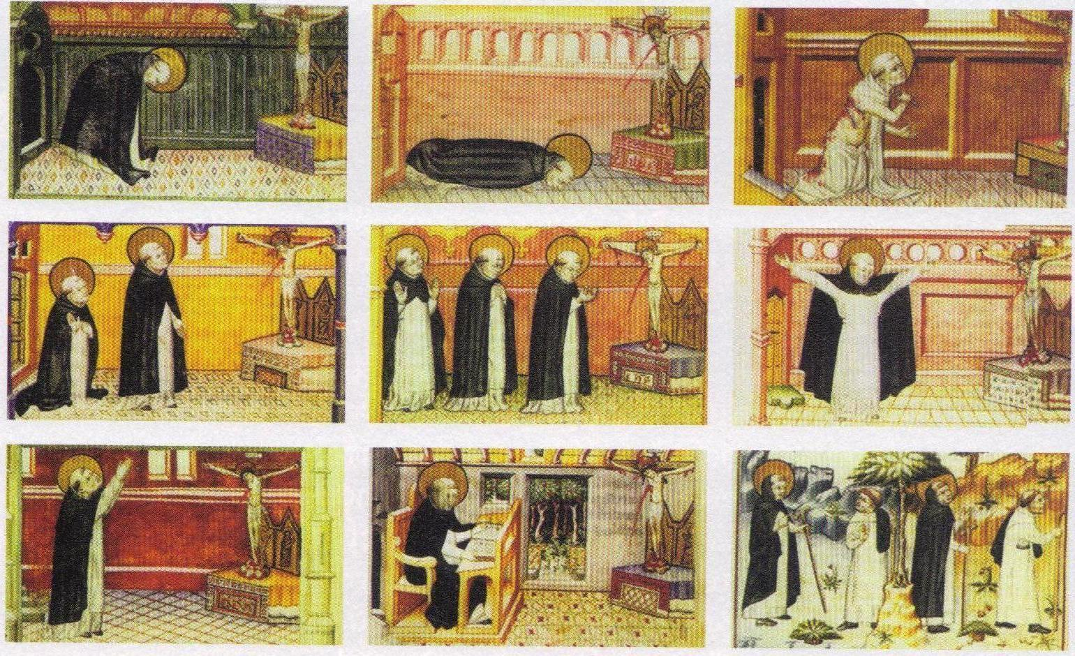 Illustrations issut d'un manuscrit du XVème siècle depuis longtemps tombé dans le Domaine Public.